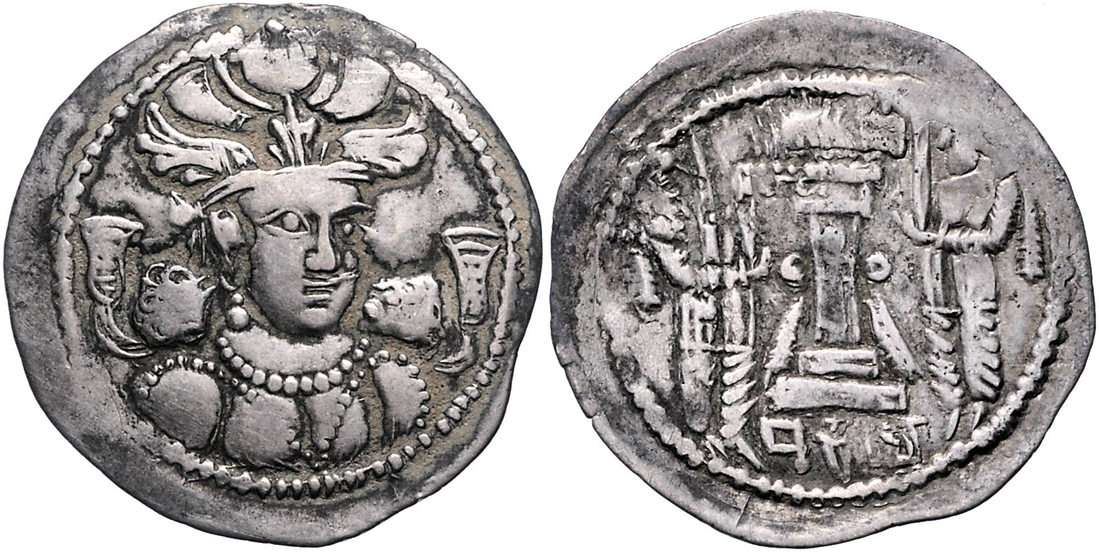 سکه یک درخم بودامیترا از فرمانروایان کیداری